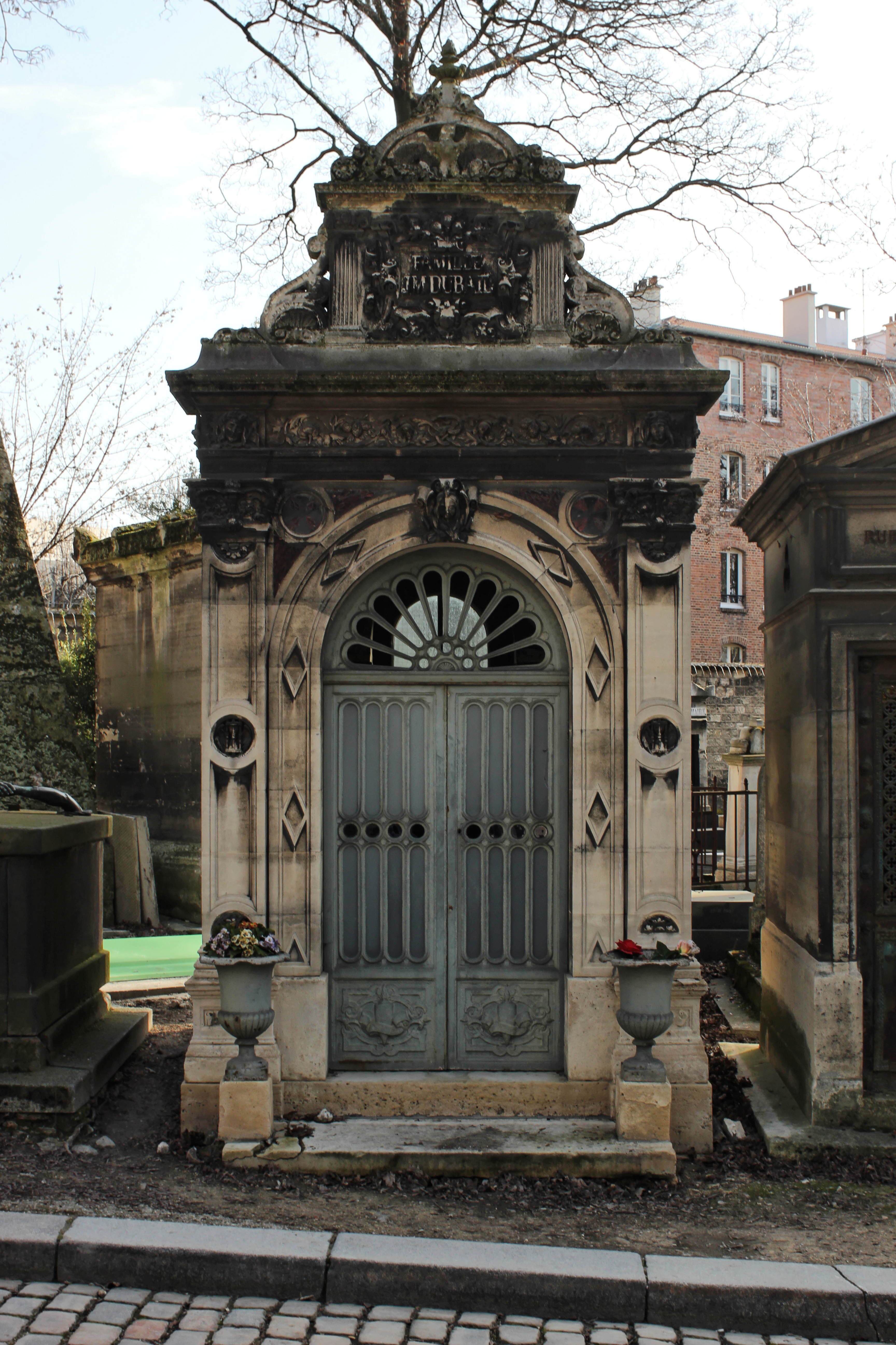 Sépulture de Pierre-Marie-Eugène Dubail (1806-1878), pharmacien ; René Dubail (1813-1891), maire du 10e arrondissement de Paris ; Elliot Dubail (1989-2018), peintre.